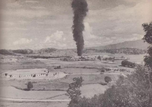 1940年10月26日雷允厂遭到日军轰炸后的情形